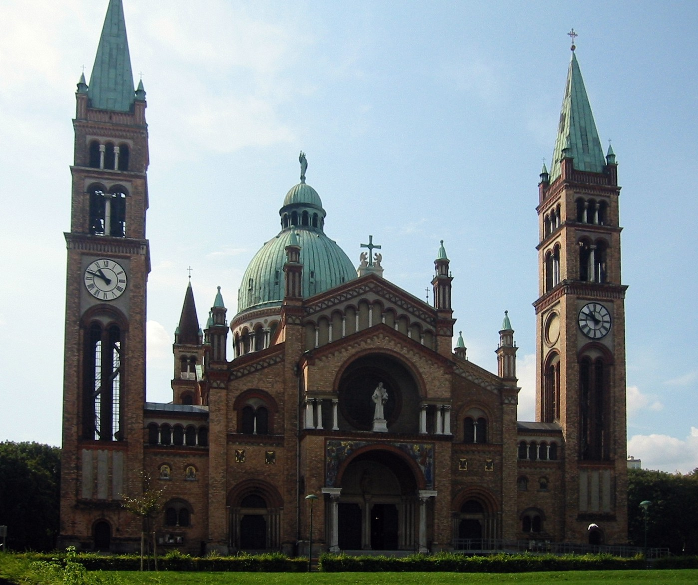 Antonskirche, Vienna